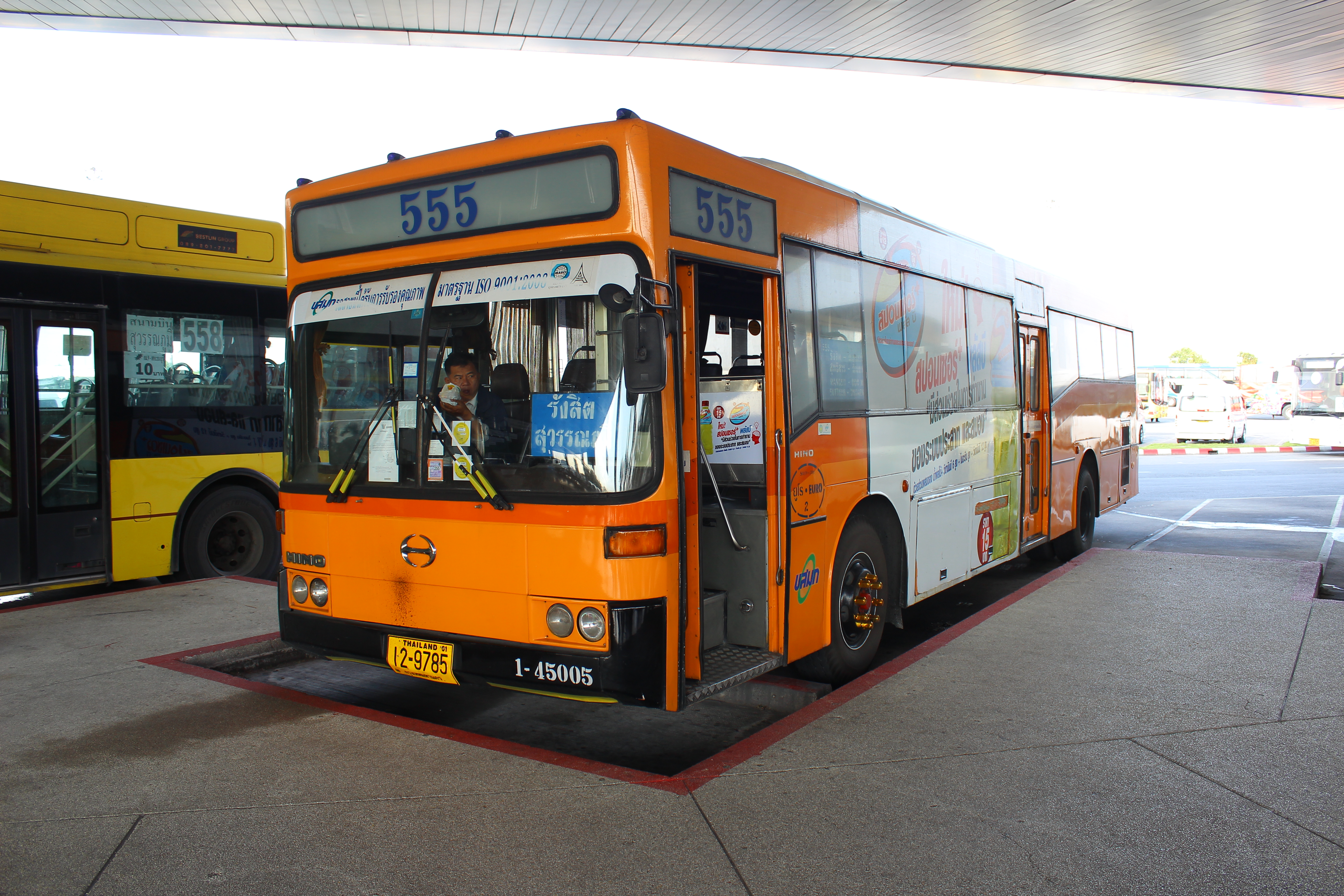 รถประจำทางสาย 555 เส้นทาง ท่าอากาศยานสุวรรณภูมิ - ถนนวิภาวดีรังสิต - อู่รังสิต ให้บริการโดย องค์การขนส่งมวลชนกรุงเทพ เขตการเดินรถที่ 1